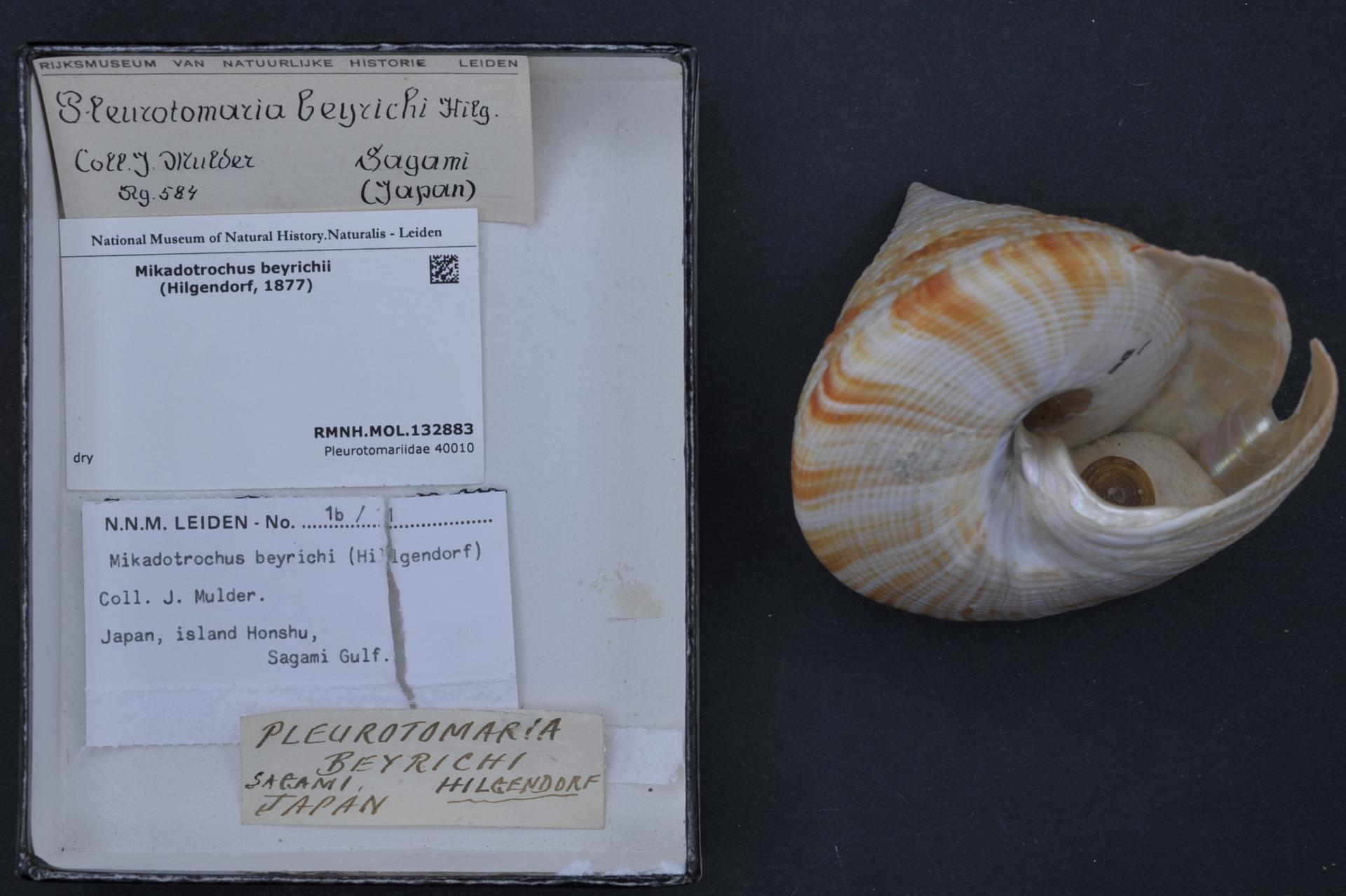 Mikadotrochus beyrichii (Hilgendorf, 1877)